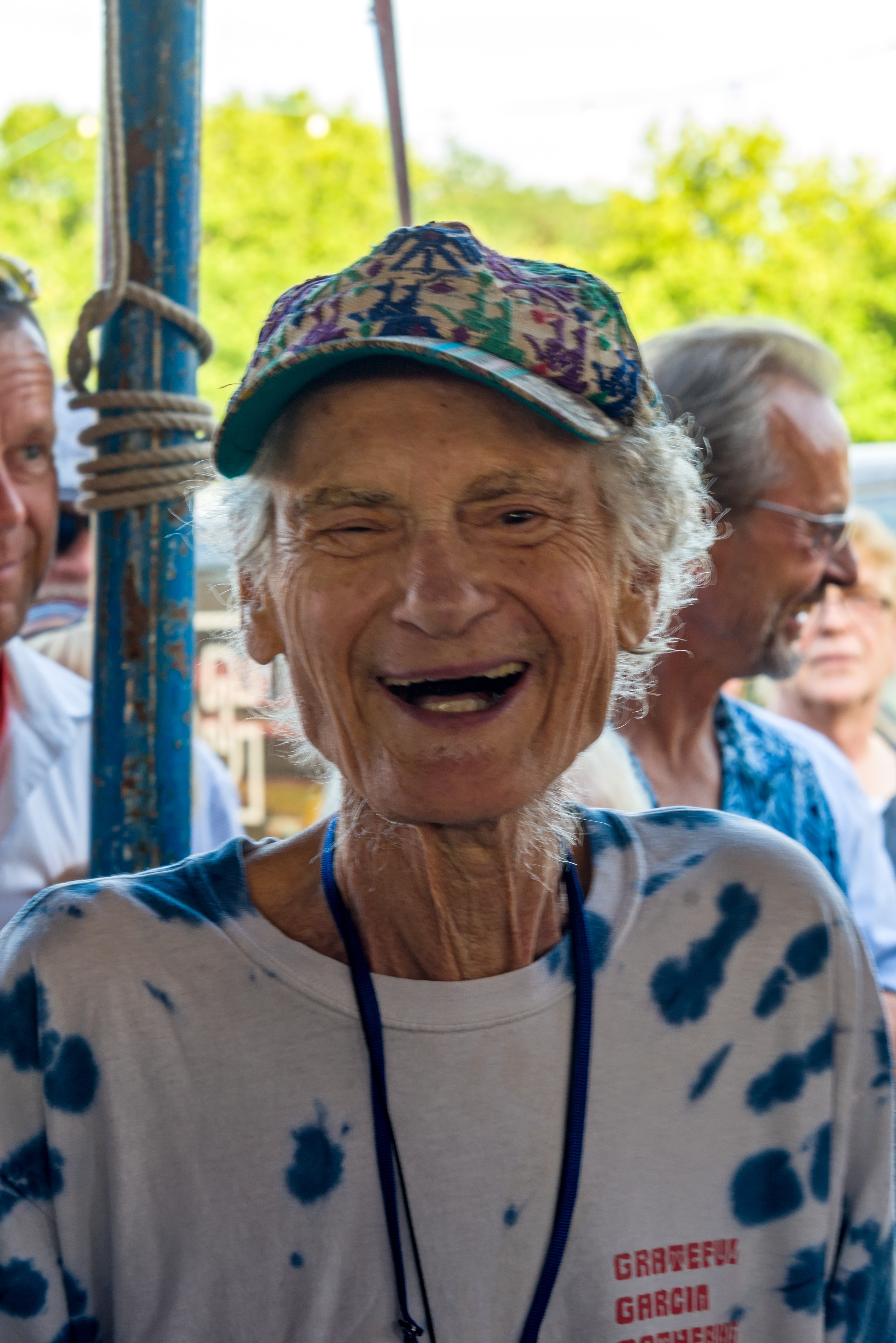 Bilder vom Zelt Musik Festival 2018 in Freiburg im Breisgau Hier die Eröffnung zusammen mit dem Förderkreis Freiburger Musikfestival e.V.